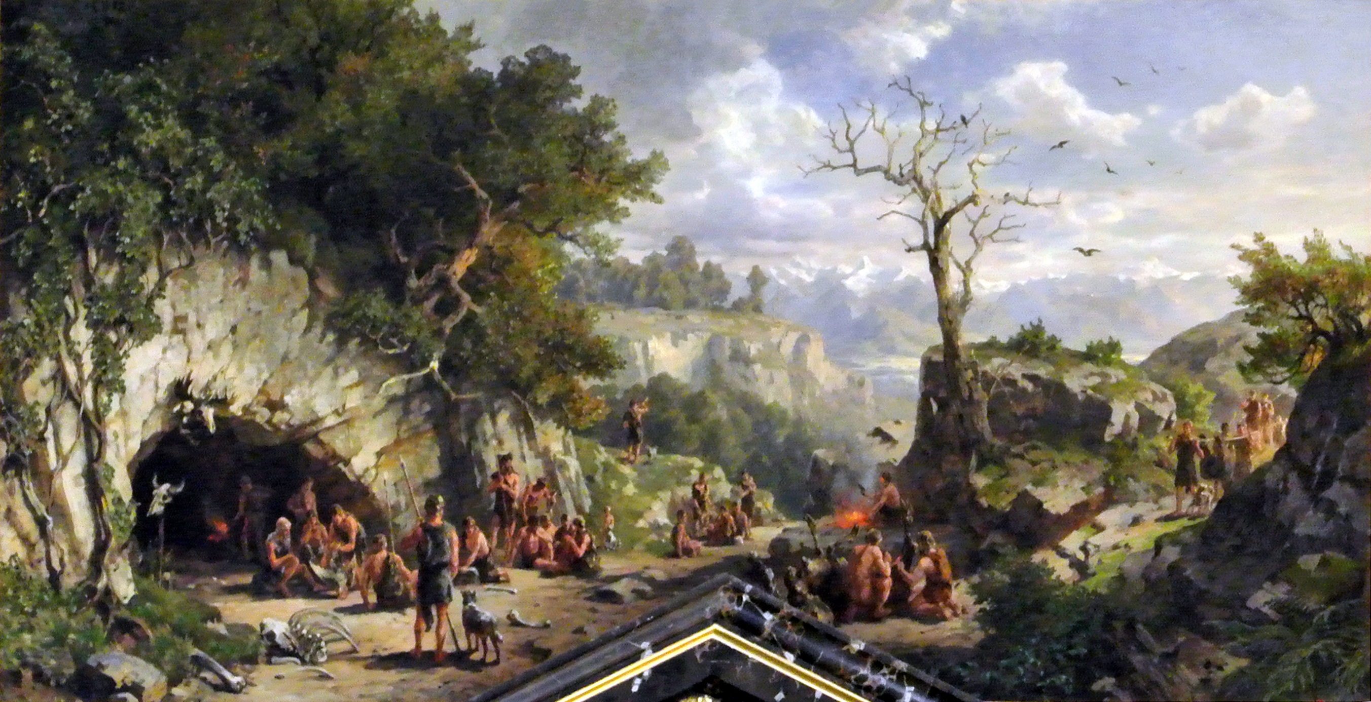 Idealbild aus der Steinzeit - Höhlenbewohner. Ideal picture from the Stone Age - cave dwellers.